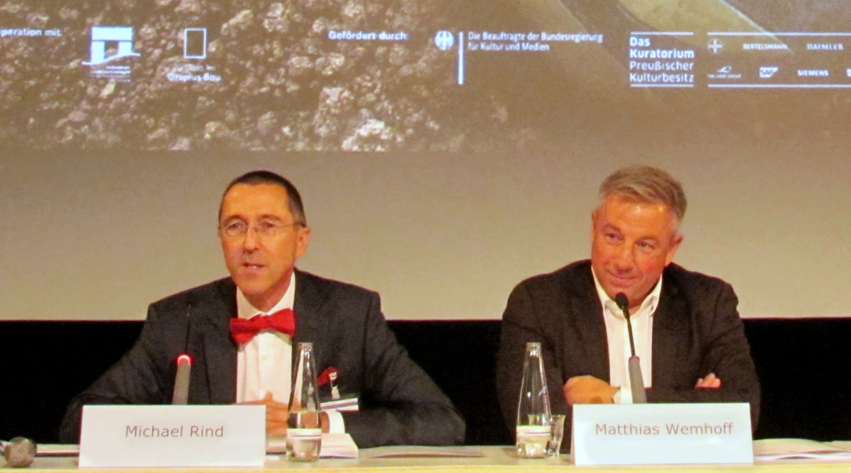 Michael Rind und Matthias Wemhoff, Pressekonferenz zur Ausstellung "Bewegte Zeiten. Archäologie in Deutschland" in Berlin